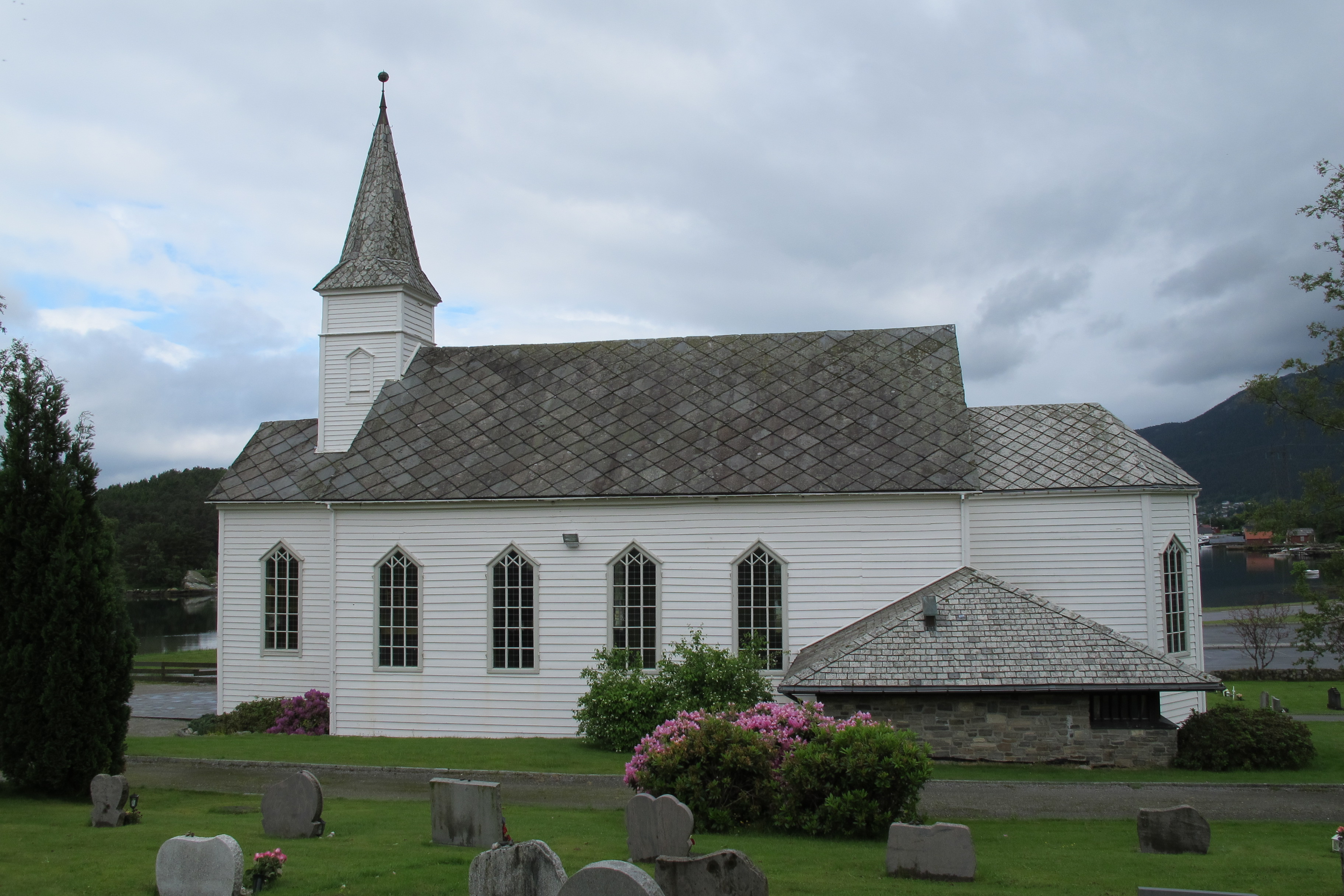 Husnes kyrkje, juni 2017